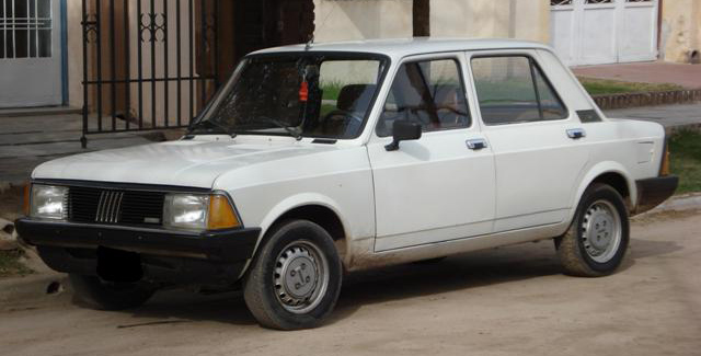 Fiat Super Europa CL 1987. Aqui se puede ver la gran cantidad de plasticos y las diferentes ruedas empleadas durante este reestyling que empezó en 1983 y concluyó en 1990, este es un Súper Europa de la versión 1.3 que, luego de 1986 se llamó CL.